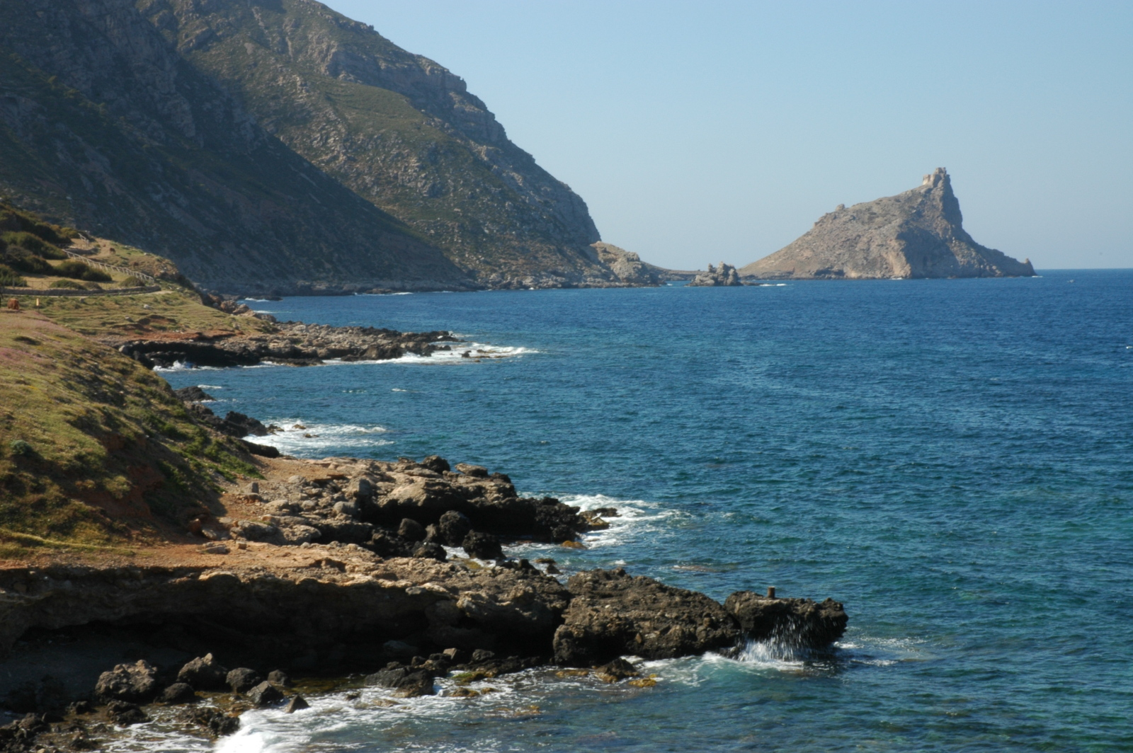 Aegadian Islands - Italia